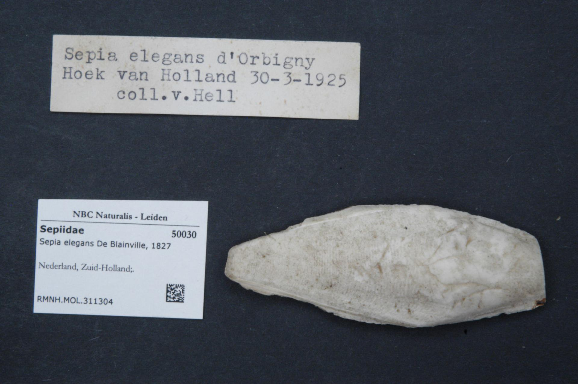 Sepia elegans De Blainville, 1827